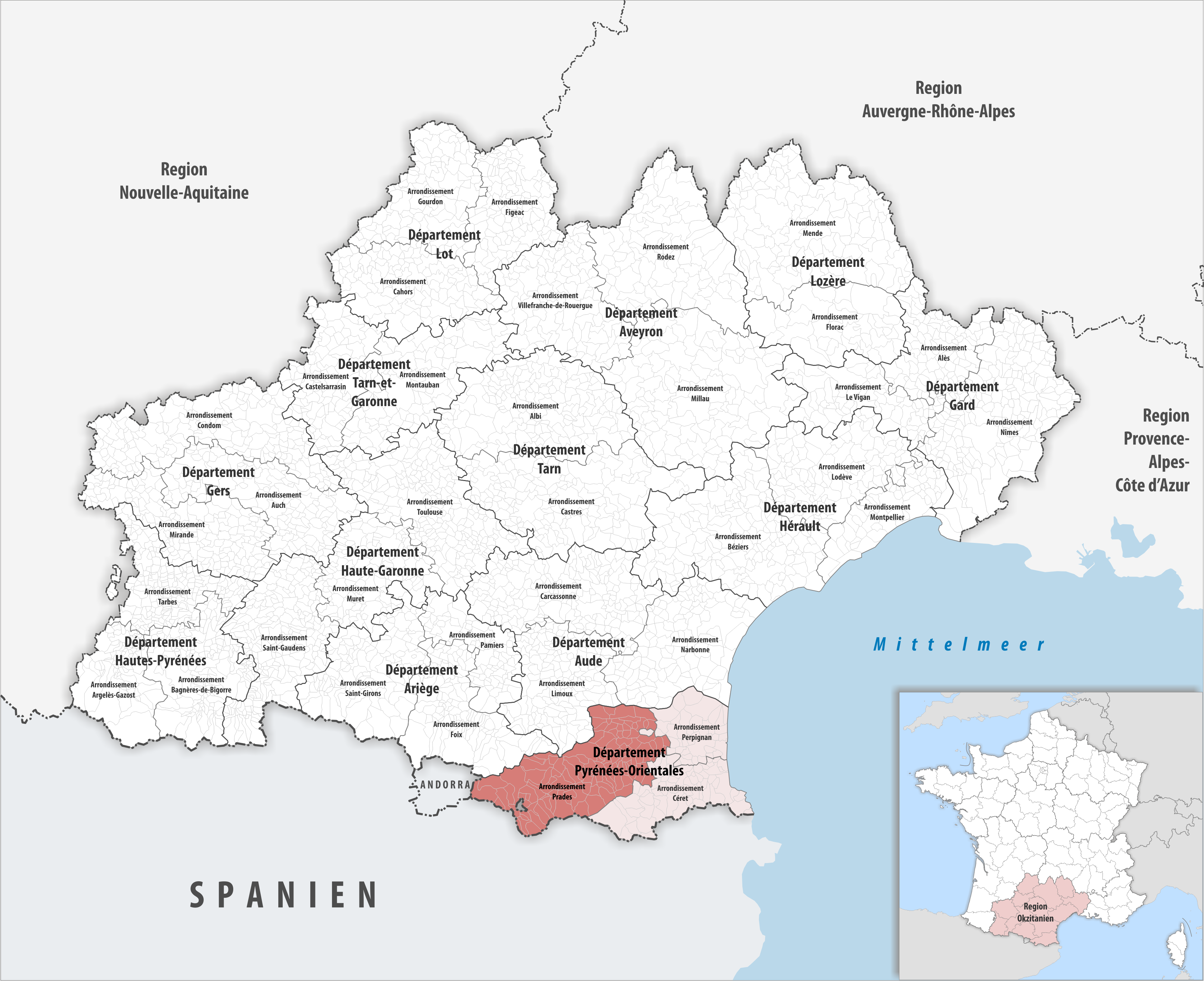 Lage des Arrondissements Prades